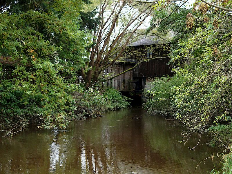 Smrčiny